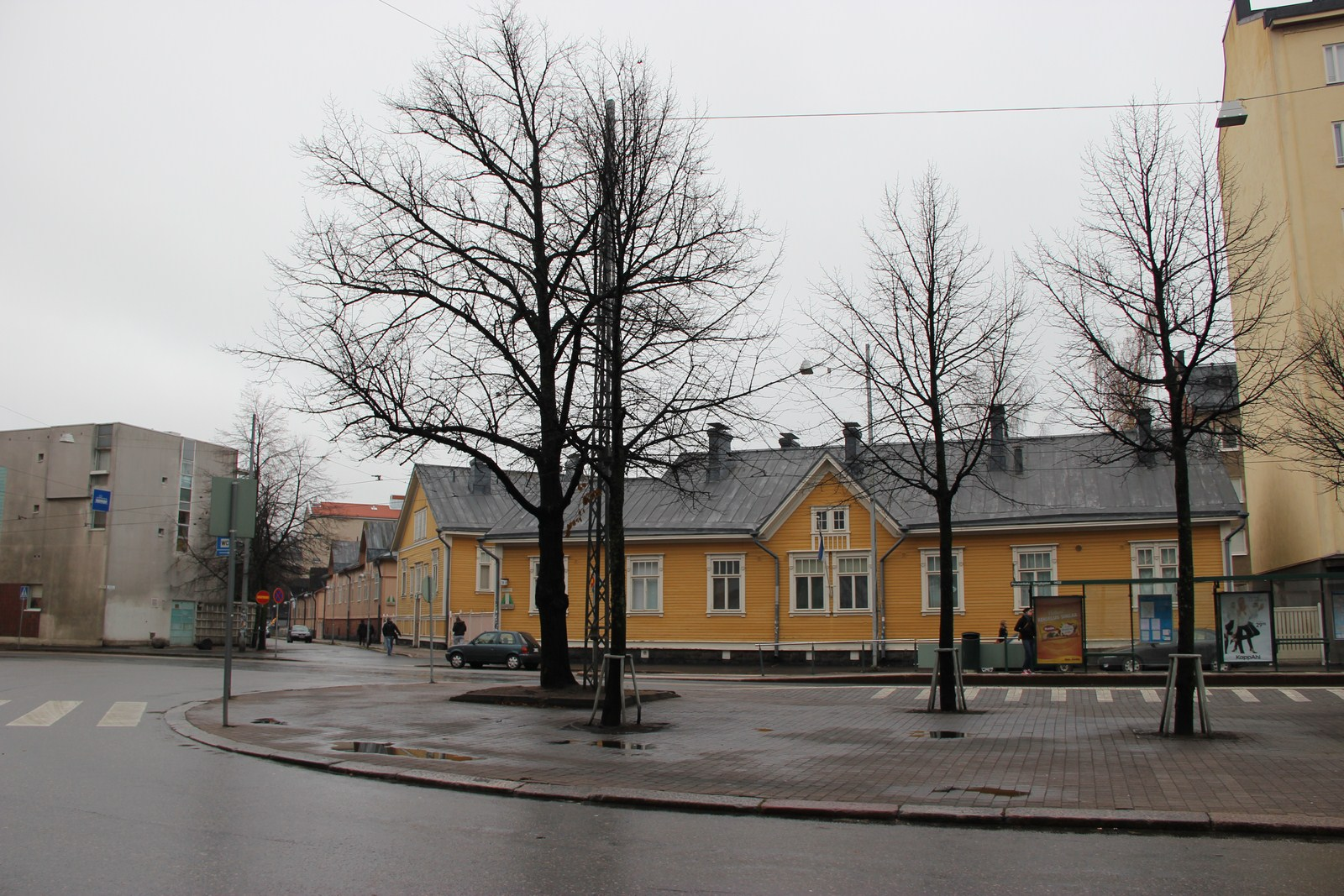 Kirstinkuja ja puutalo Alppilassa Porvoonkadun toiselta puolelta katsoen